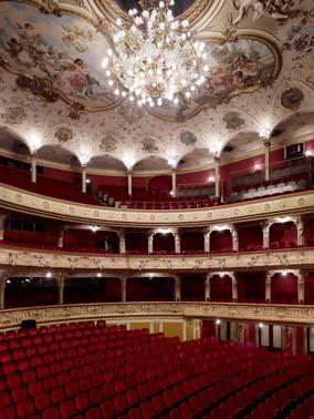 Blick in den Zuschauerraum des Opernhauses Zürich von der Seitenloge aus.